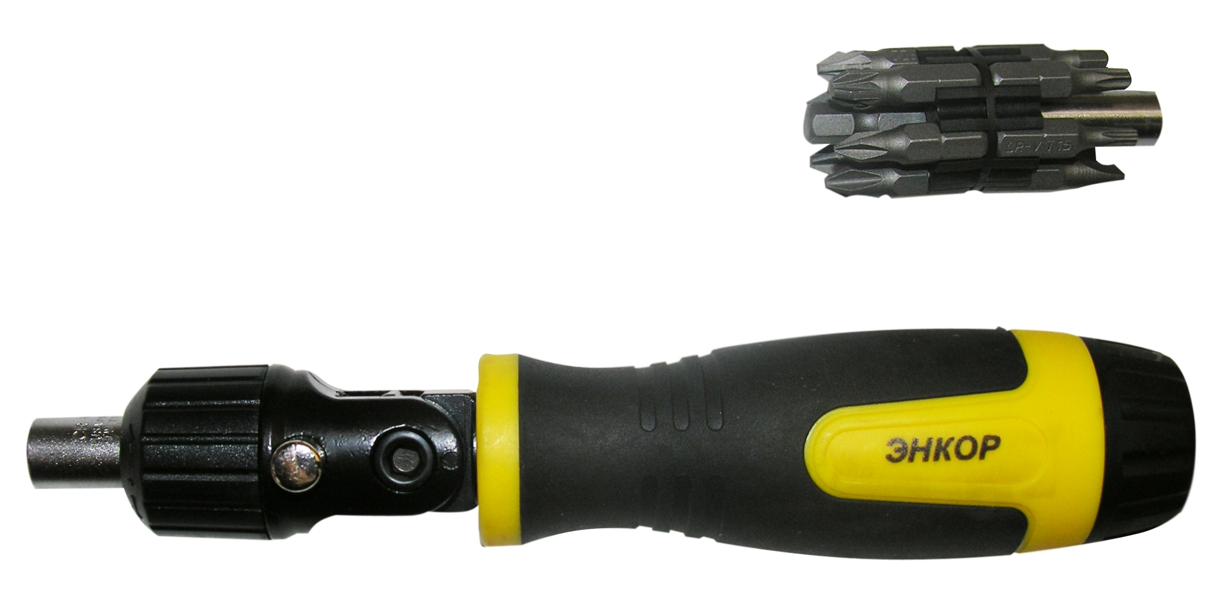 Отвёртка с поворотной рукояткой и полостью для хранения вставок. Над отвёрткой расположена кассета со вставками и магнитным держателем, хранящаяся в рукоятке.